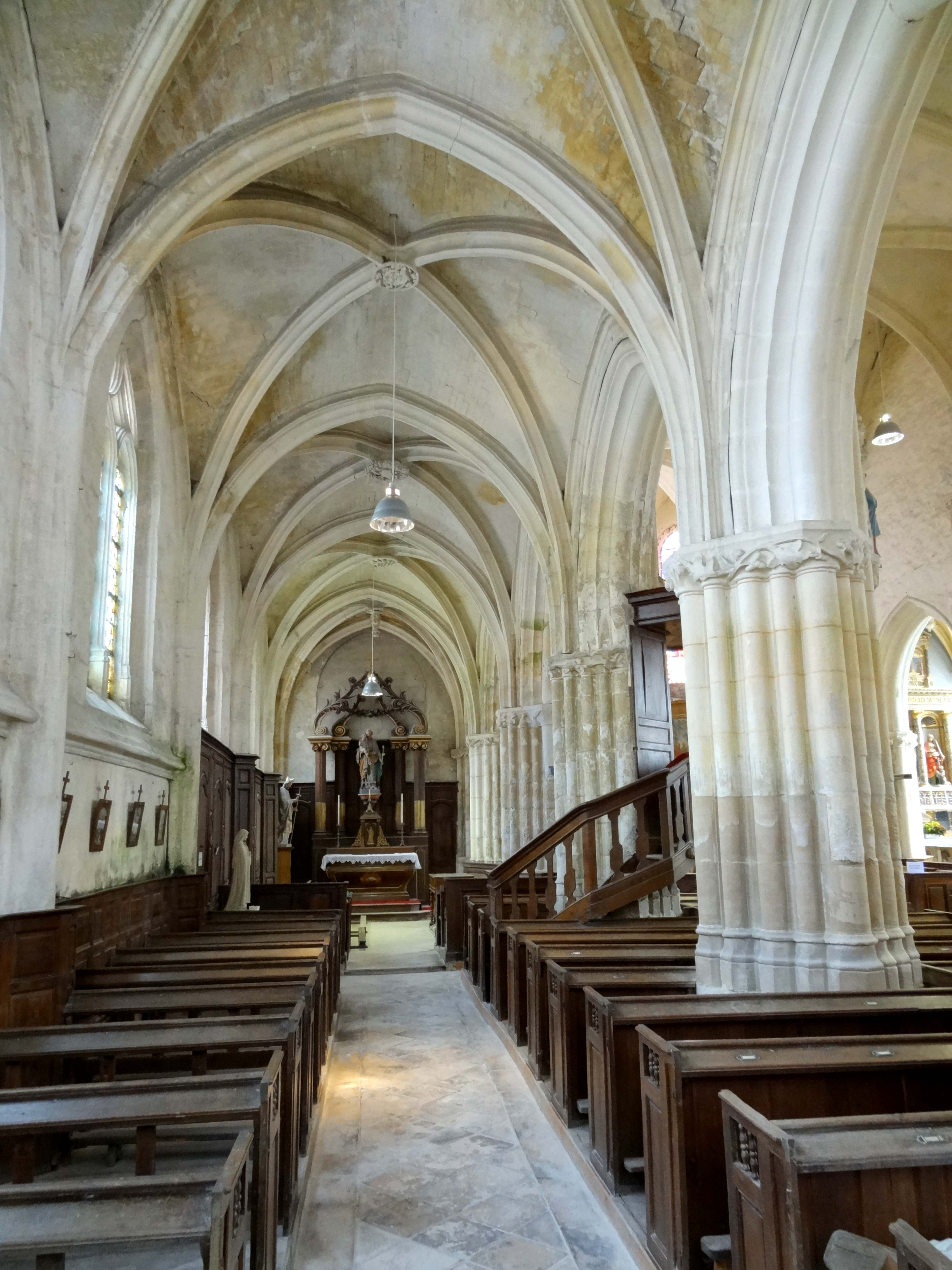 Intérieur de l'église - voir titre.